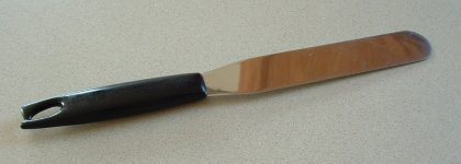 Frostin spatula